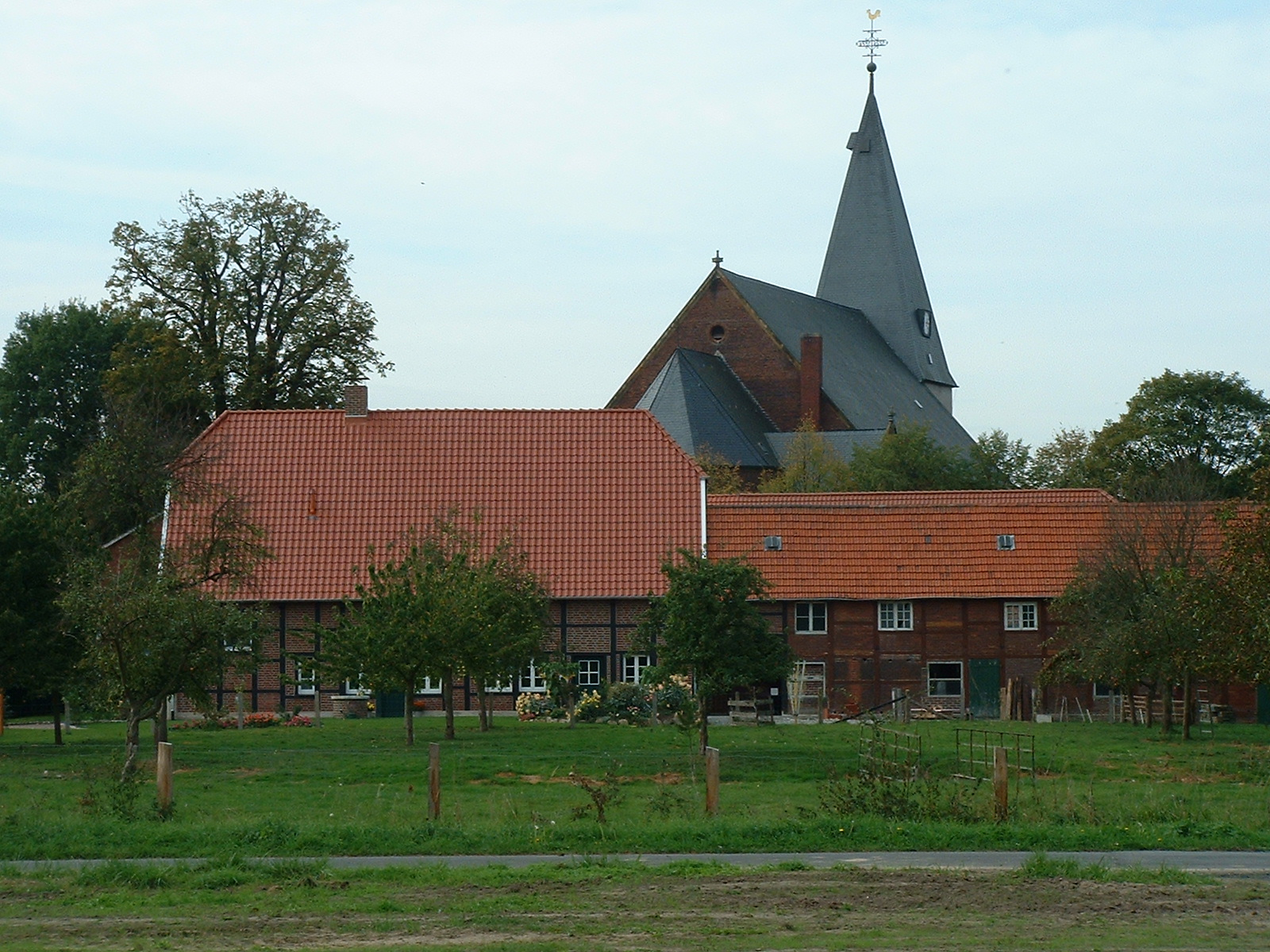 Haus Enniger von der Ostseite mit der Kirche St. Mauritius